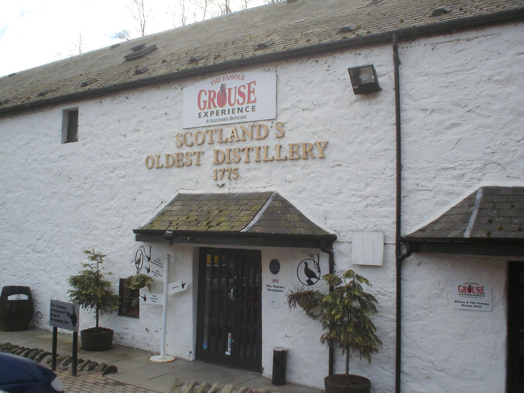 Autore= Neil Richards [1] Fonte= Flickr [2] Descrizione= La distilleria Glenturret a Crieff (Perthshire, Scozia) Licenza=CC-BY 2.0 Note=